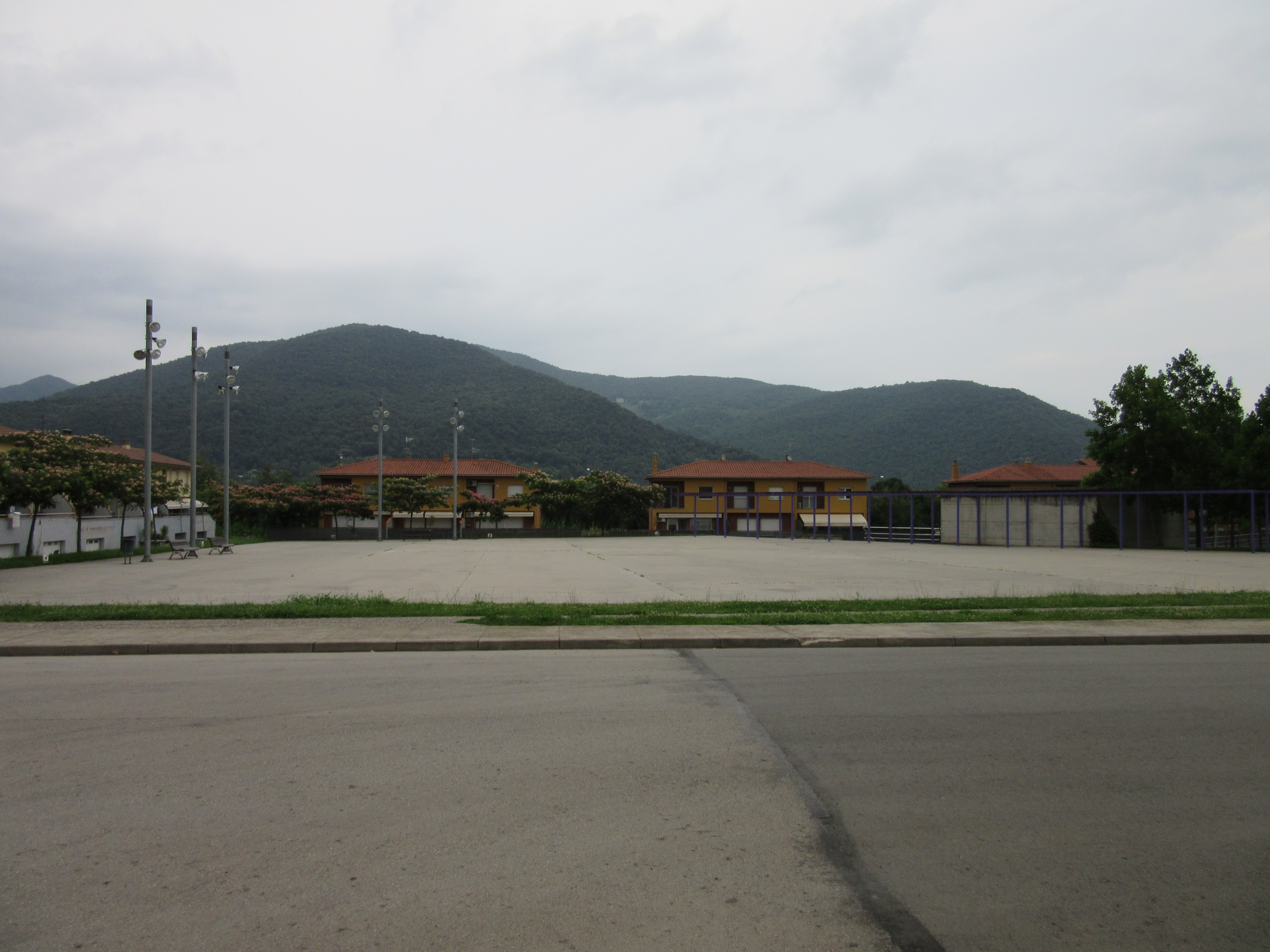 Plaça Nova de La Canya (Garrotxa)